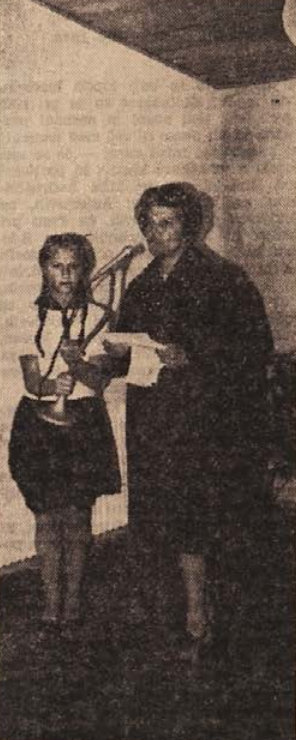 Mara Rupena 19. okt. 1968 govori na otvoritvi osnovne šole v Mirni Peči